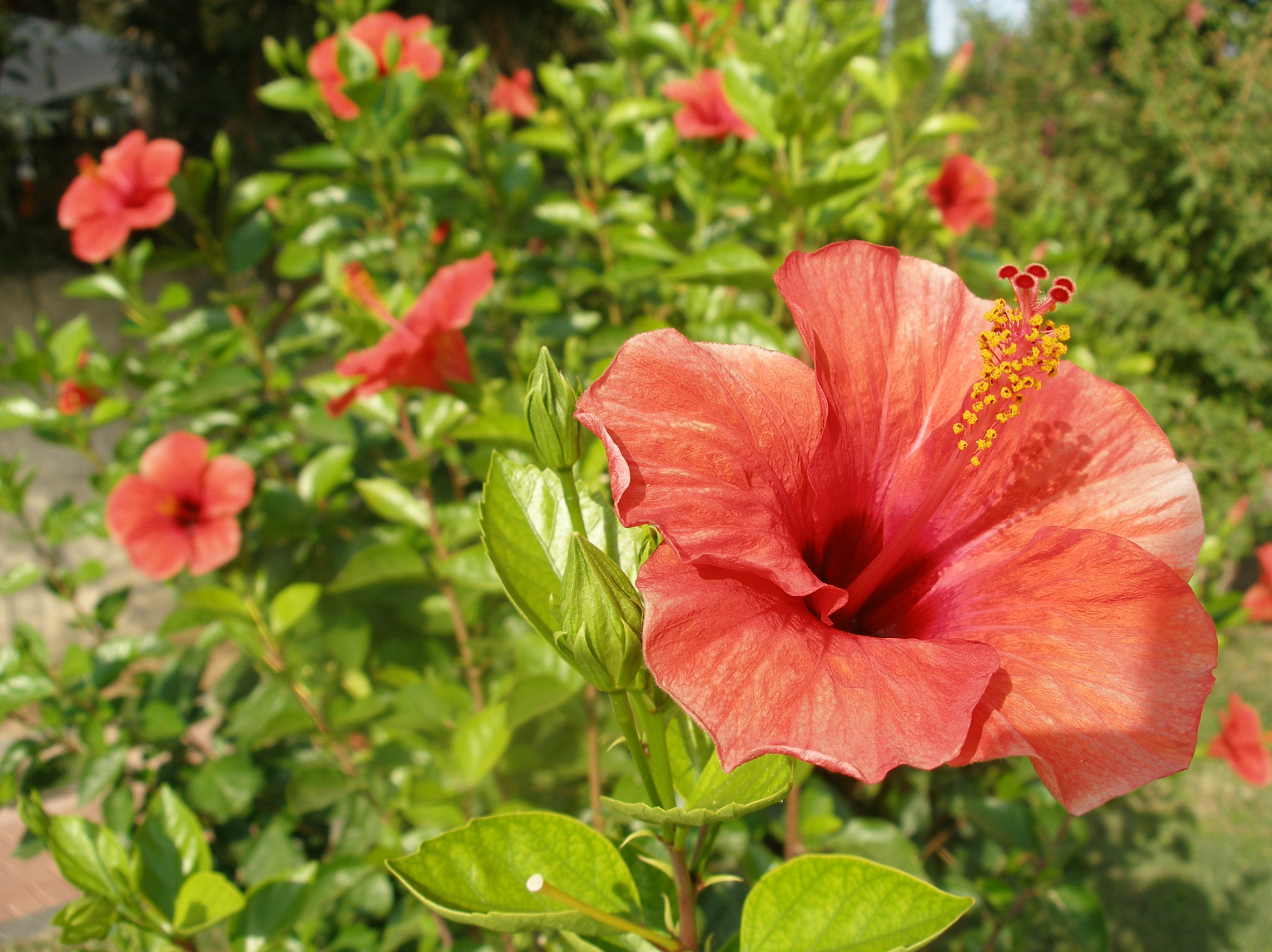 Hibiskus